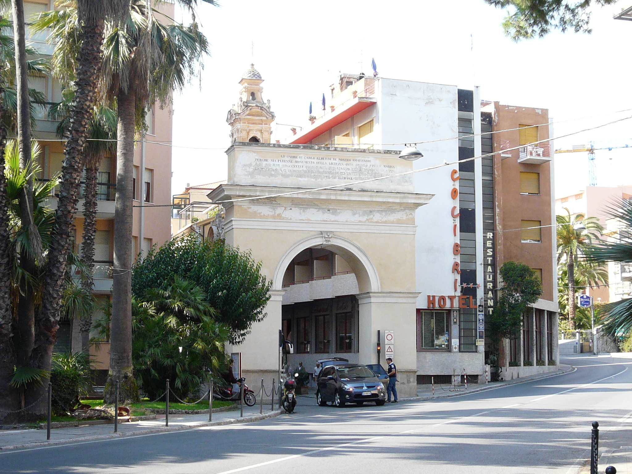 Arco al sovrano Carlo Alberto di Savoia presso Finale Ligure, Liguria, Italia